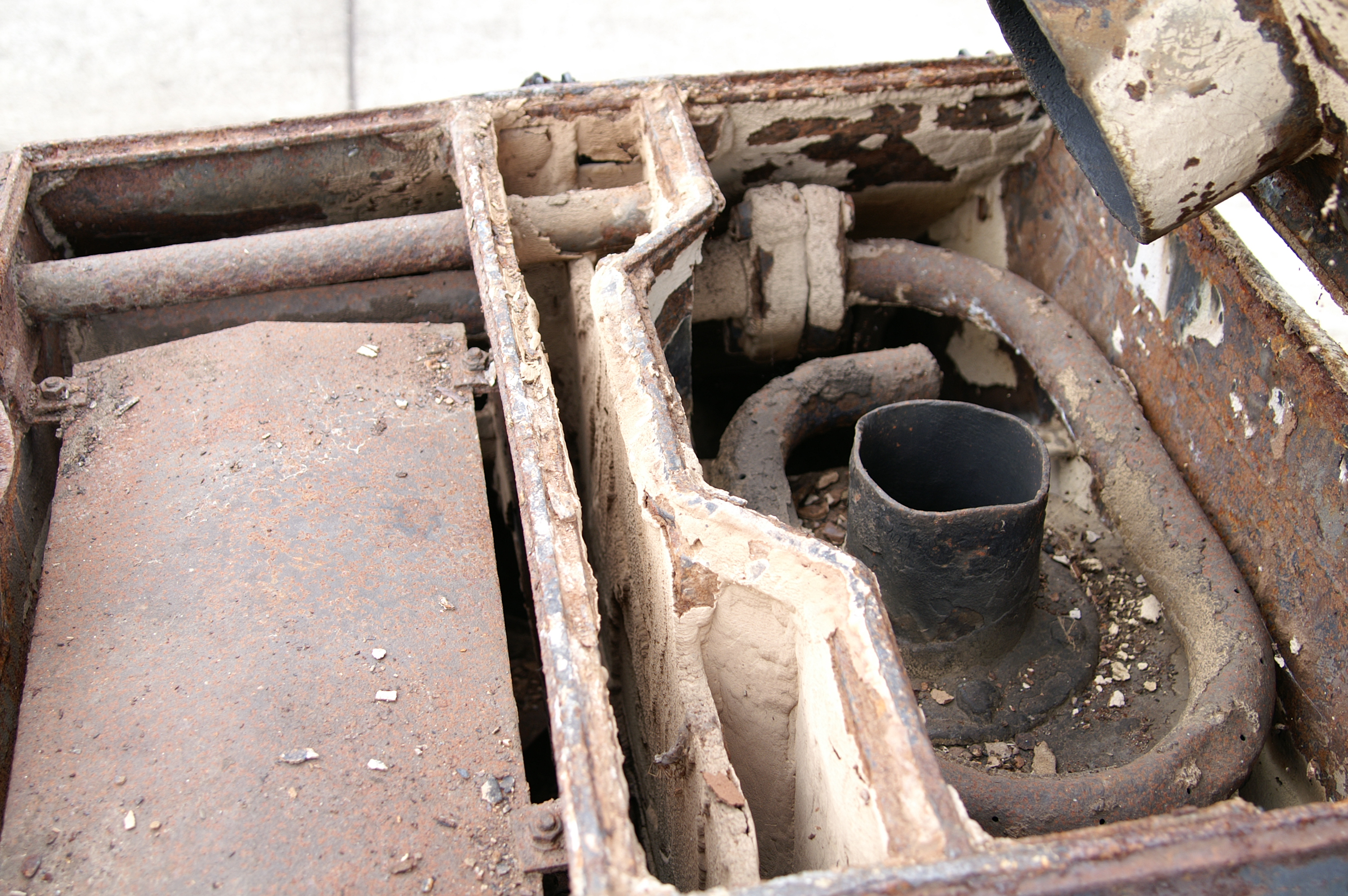 Innenansicht Mischkasten Bauart IfS